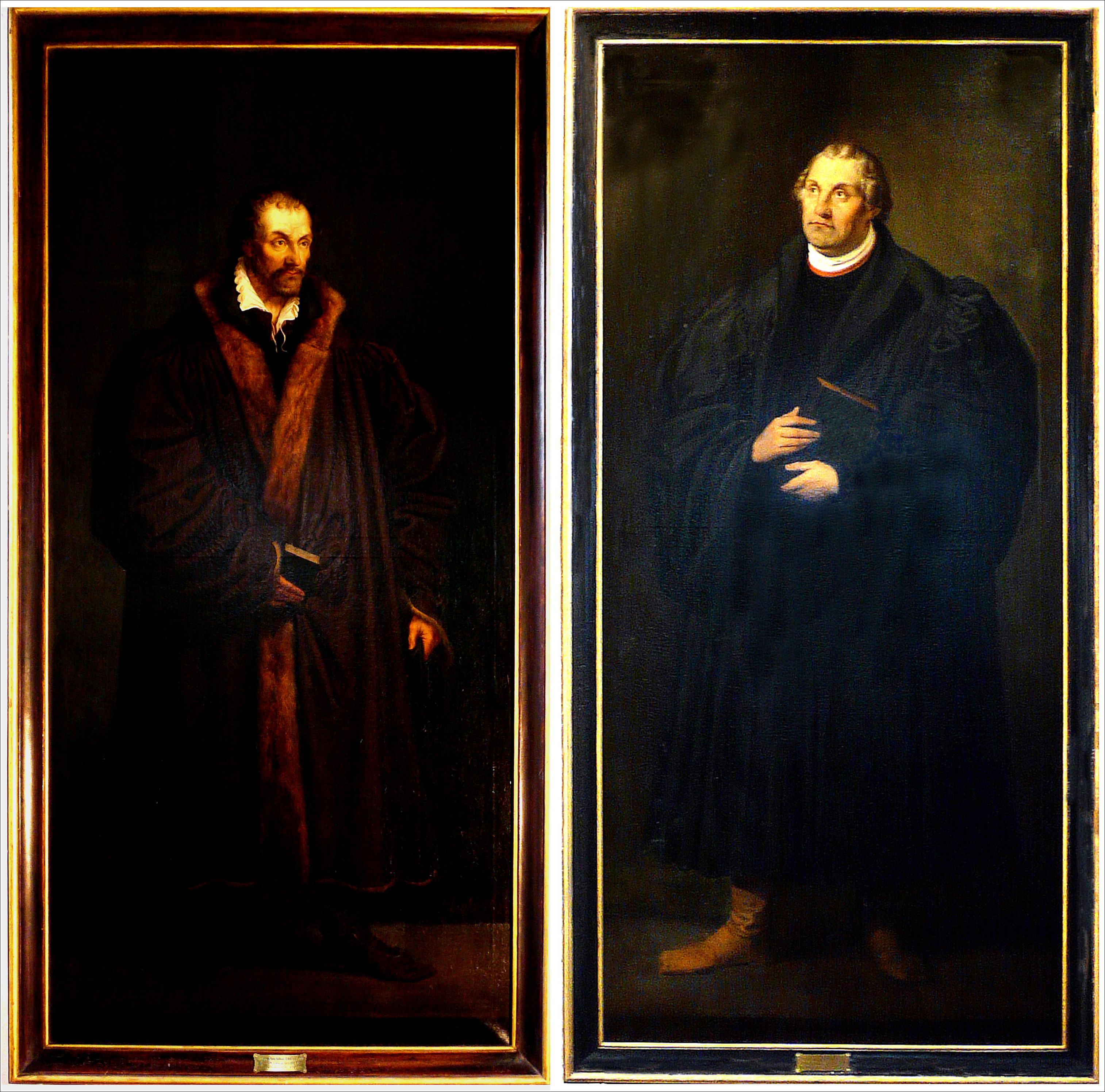 Grundlage der Gemälde waren seine Zeichnungen aus dem Jahre 1820 von den Originalen des Lucas Cranach.